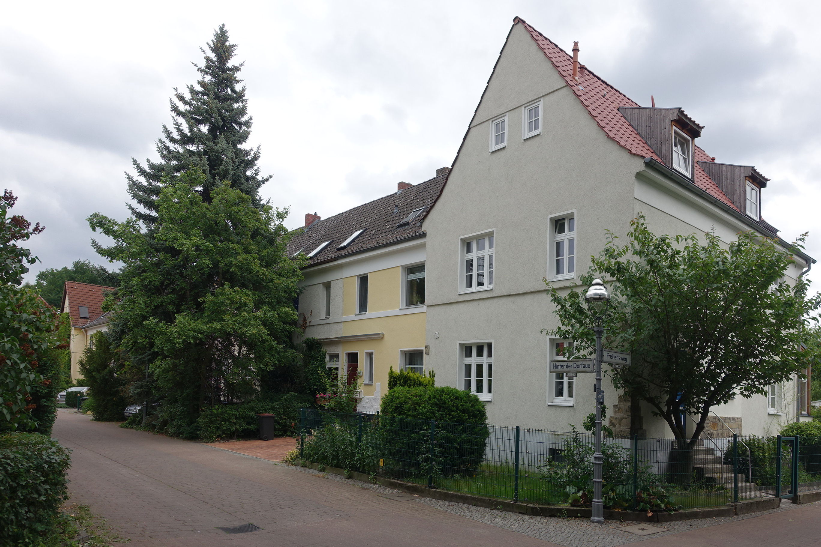 Siedlung